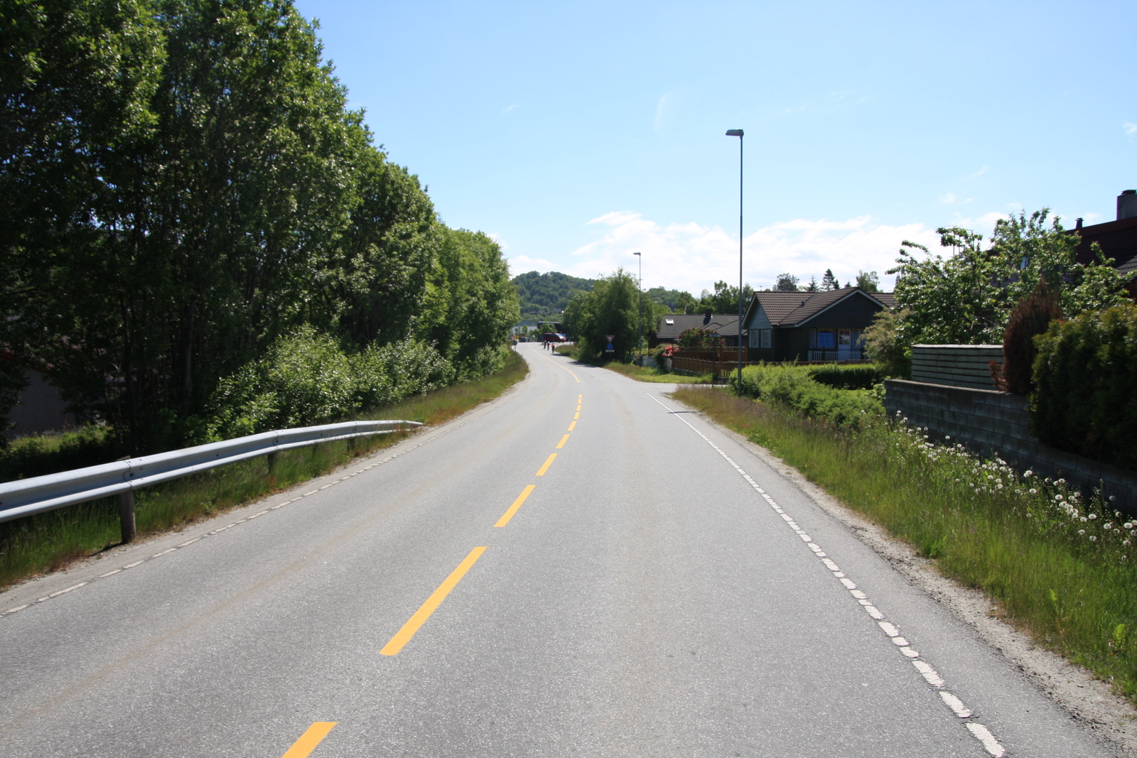 Fylkesvei 294 Figgjoveien